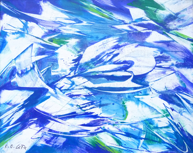 K. O. Götz, Giverny-Ex IV, 1993, Mischtechnik auf Leinen, 80 x 100 cm